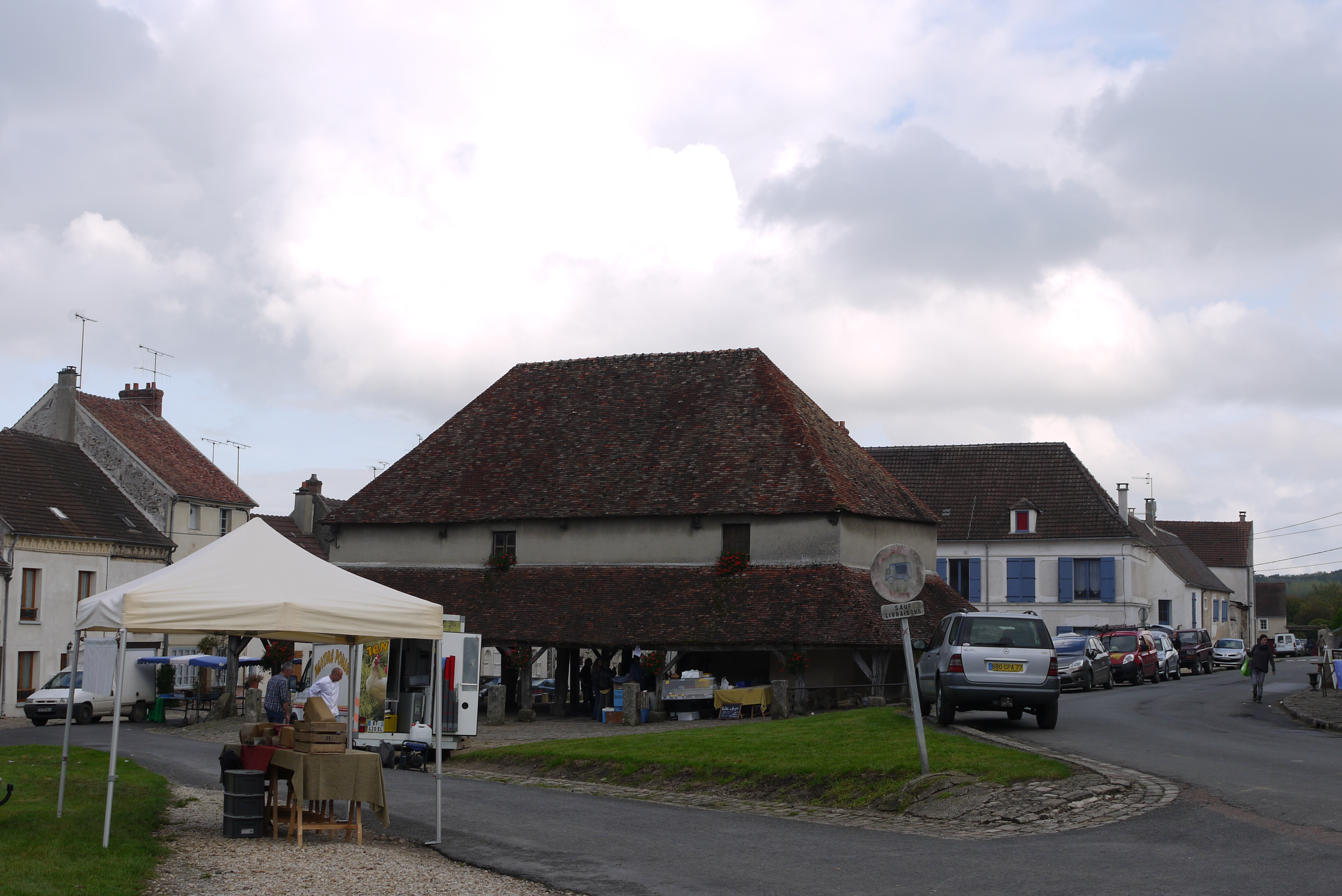 La halle de Marigny-en-Orxois, un dimanche après le marché.